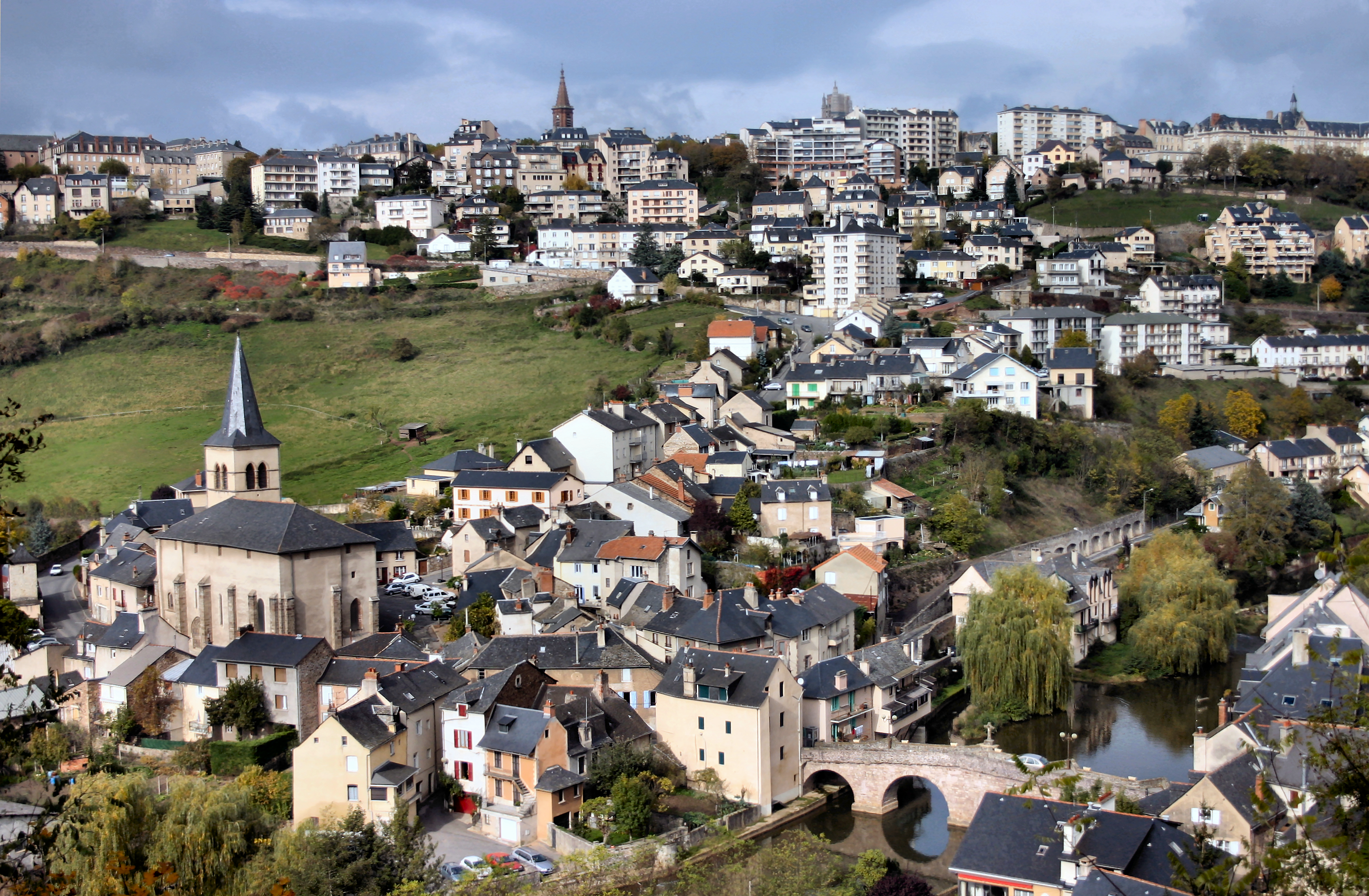 Le Monastère au bord de l'Aveyron, dominé par la ville de Rodez. Canon EOS 300D